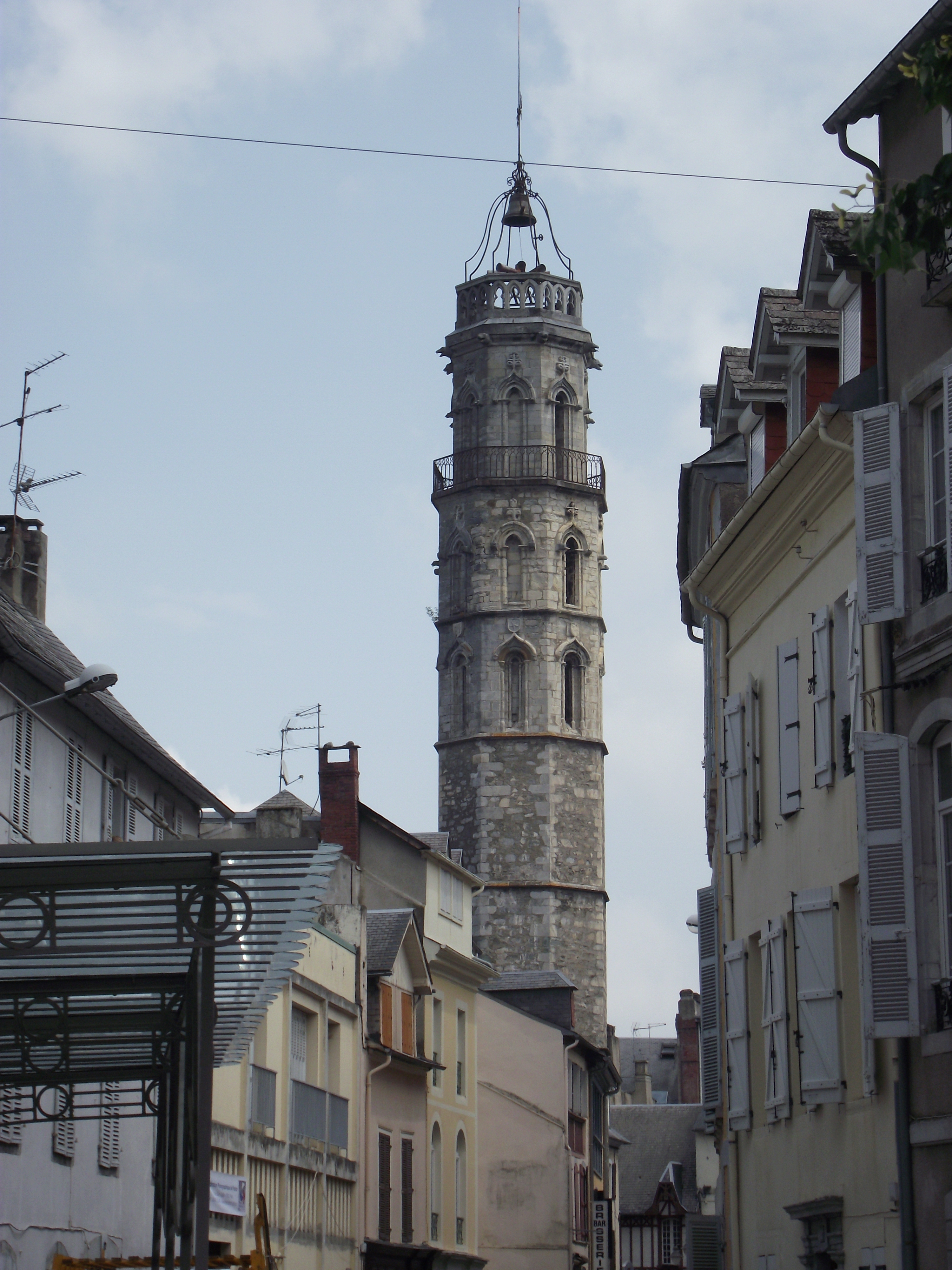 Tour des Jacobins (Bagnères-de-Bigorre, 65)